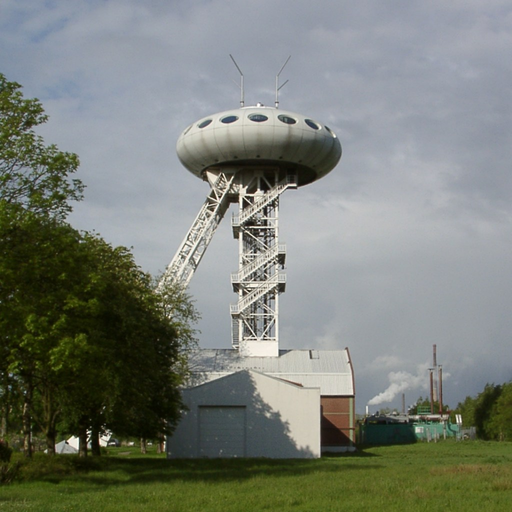 Colani-UFO, Lünen, Nordrhein-Westfalen, 08.05.2005